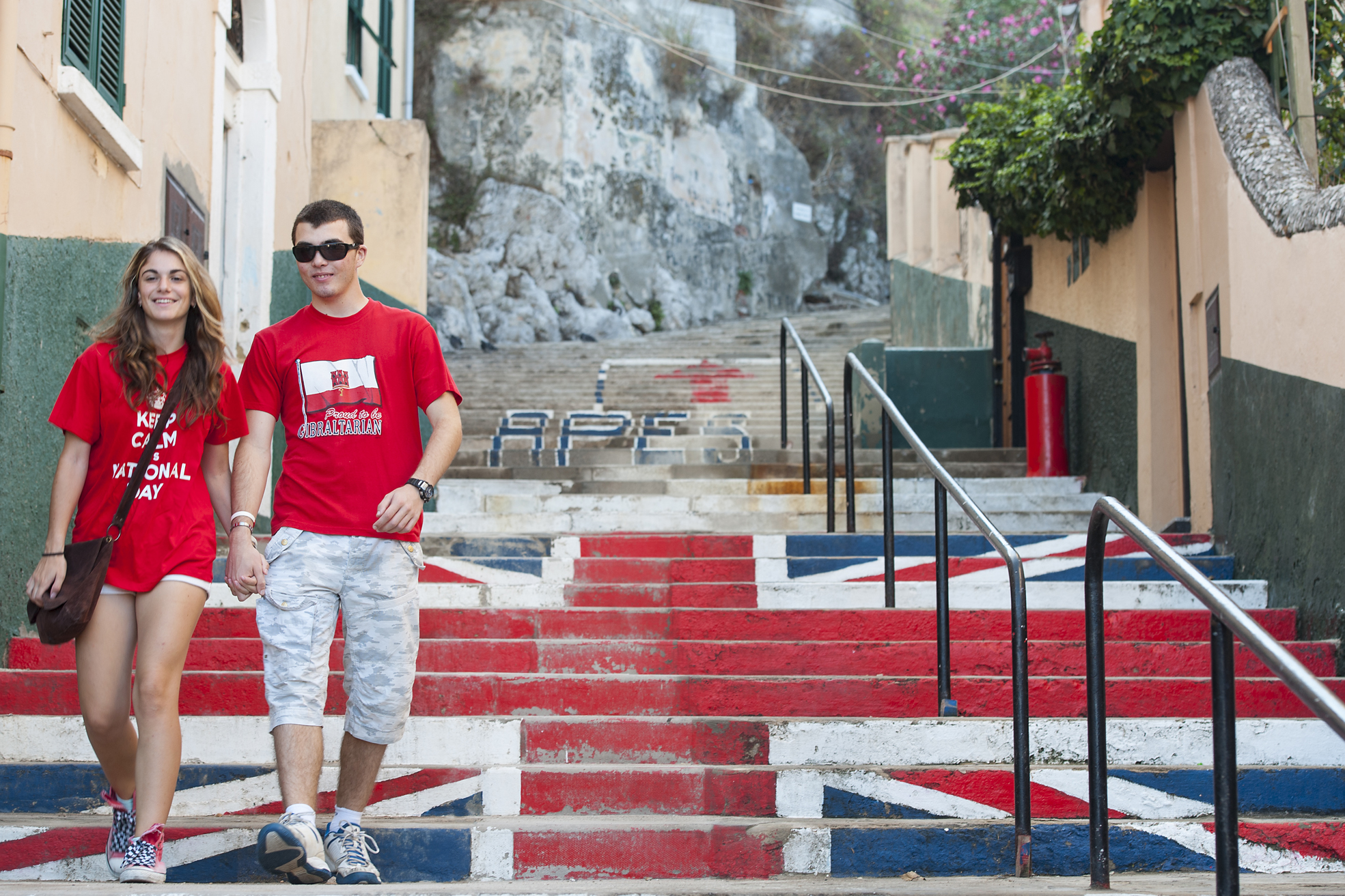 GIBRALTAR NATIONAL DAY 2013 - MARCOS MORENO03